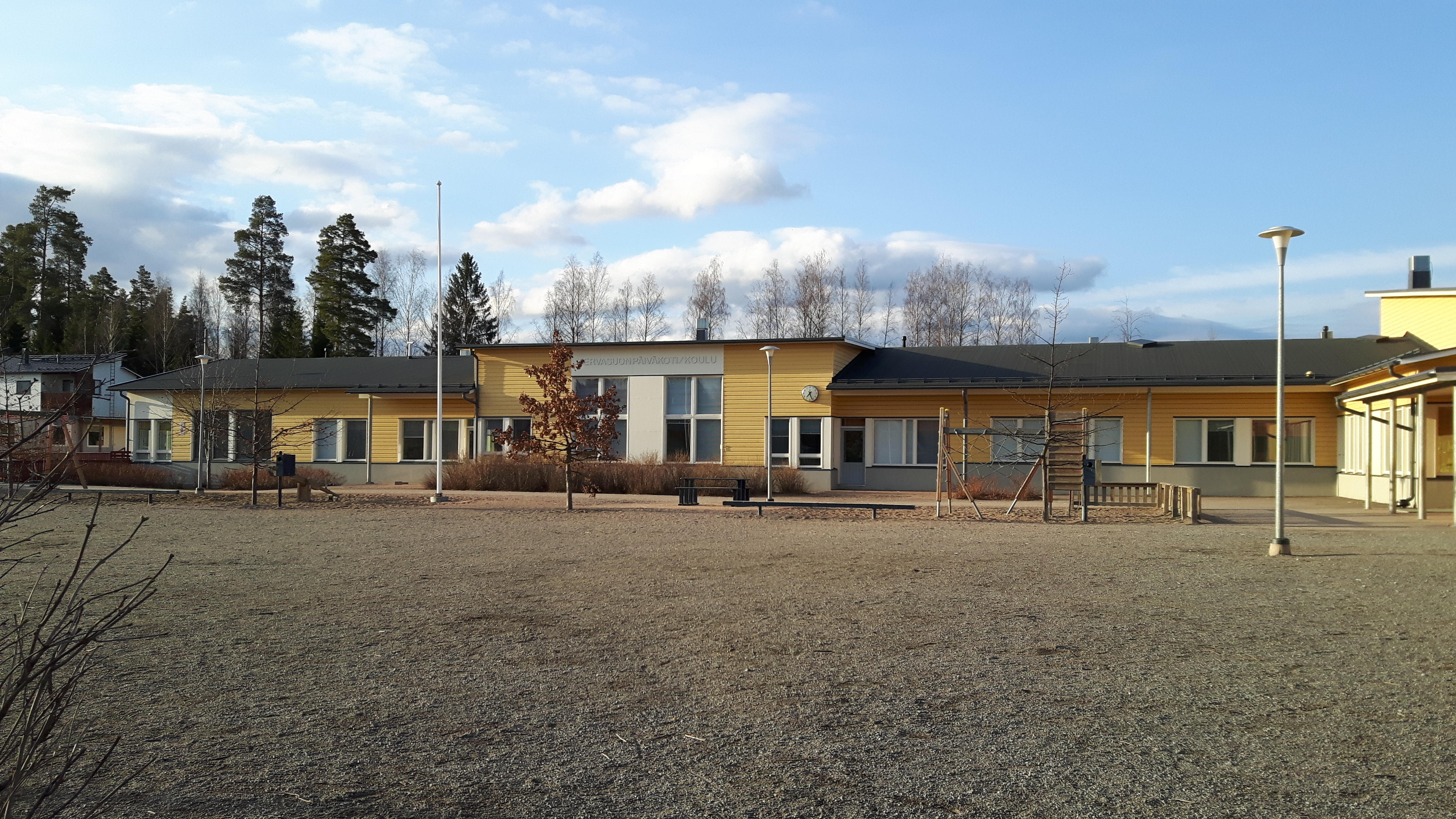 Tervasuon koulun piha